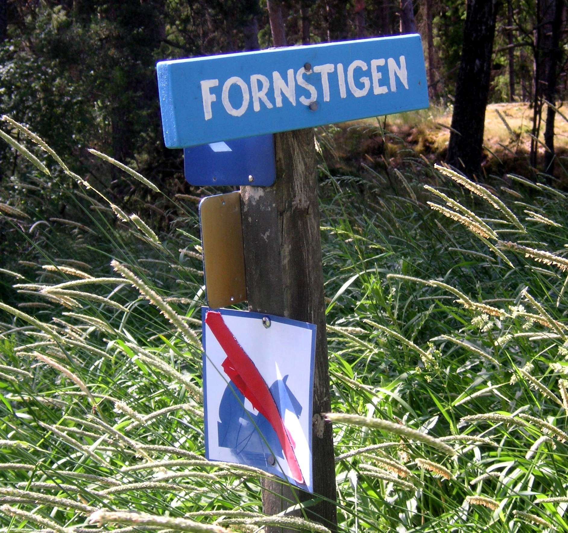 Skylt "Fornstign" på Lovön